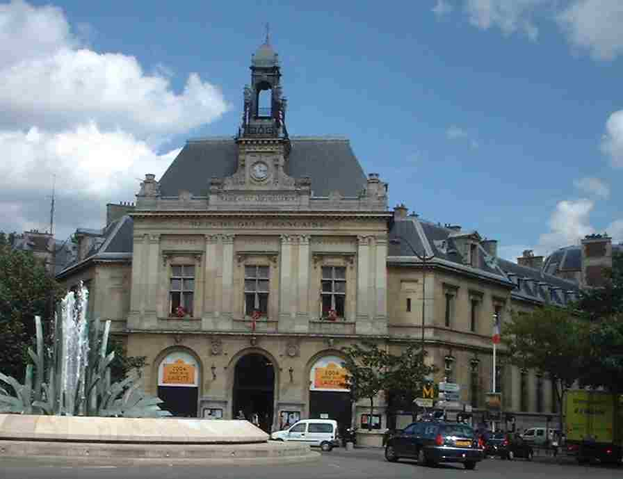 Mairie annexe du XXème arrondissement de Paris